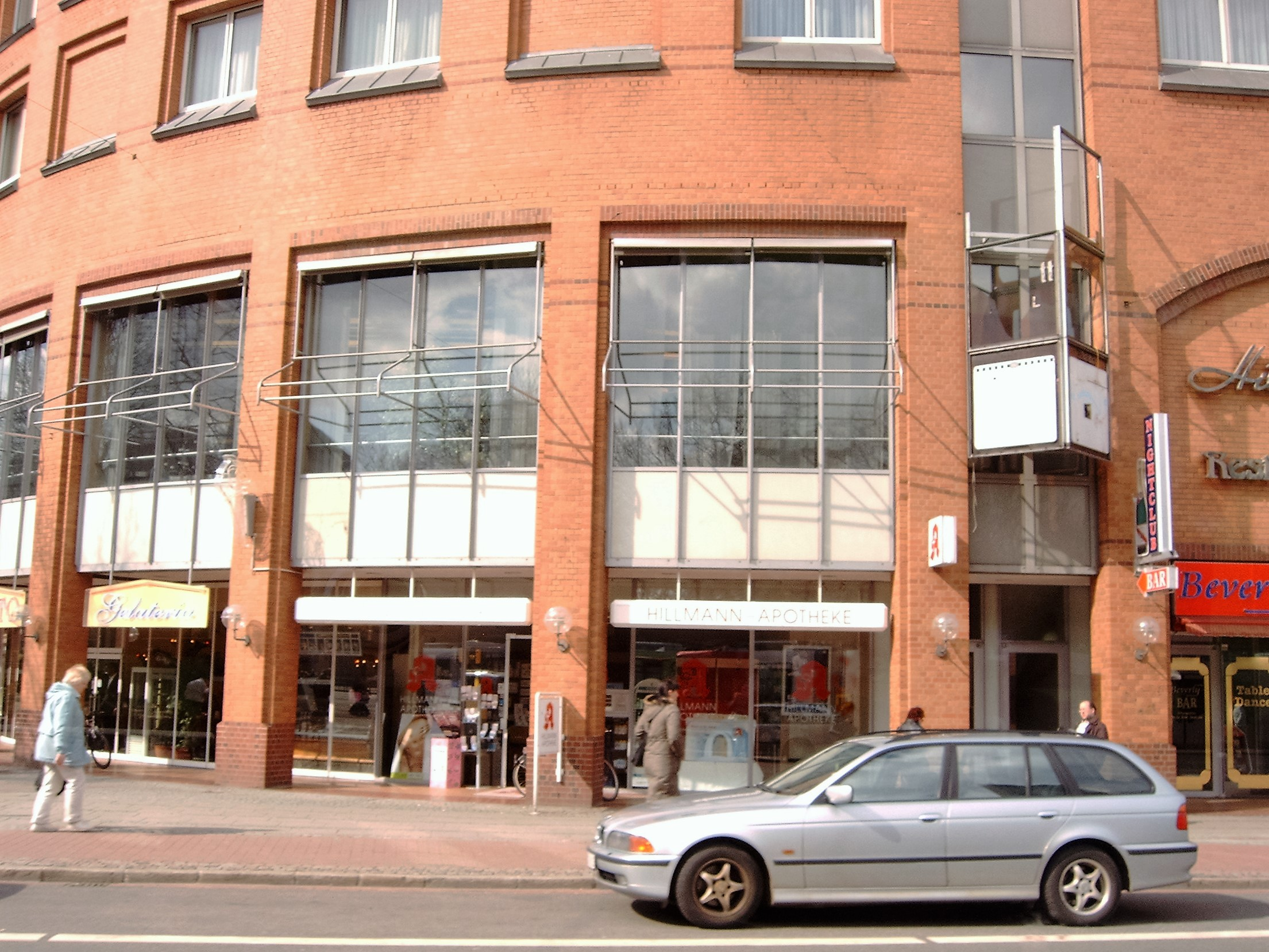 Teilansicht des Hotels am Hillmannplatz in Bremen-Mitte, Deutschland. Ansicht vom Herdentorsteinweg.